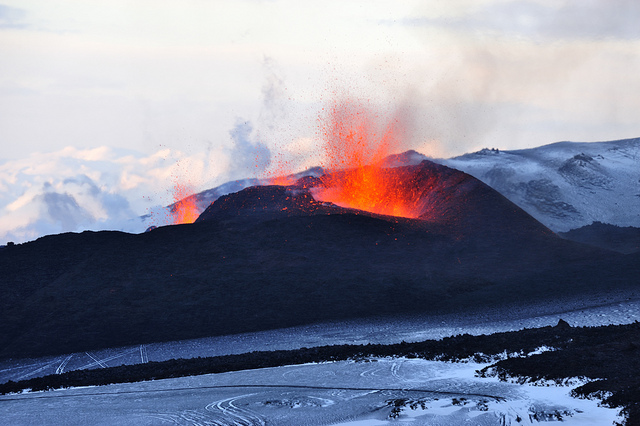 Seit 20.03.2010 ist auf dem Fimmvörðuháls ein Vulkanausbruch im Gange, der aufgrund chemischer Analysen der ausgeworfenen Materialen dem System des Eyjafjallajökull zugerechnet wird.